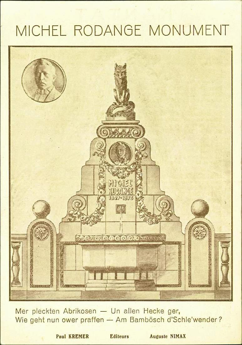 Luxembourg. Inauguration du monument Michel Rodange le 26 juin 1932.